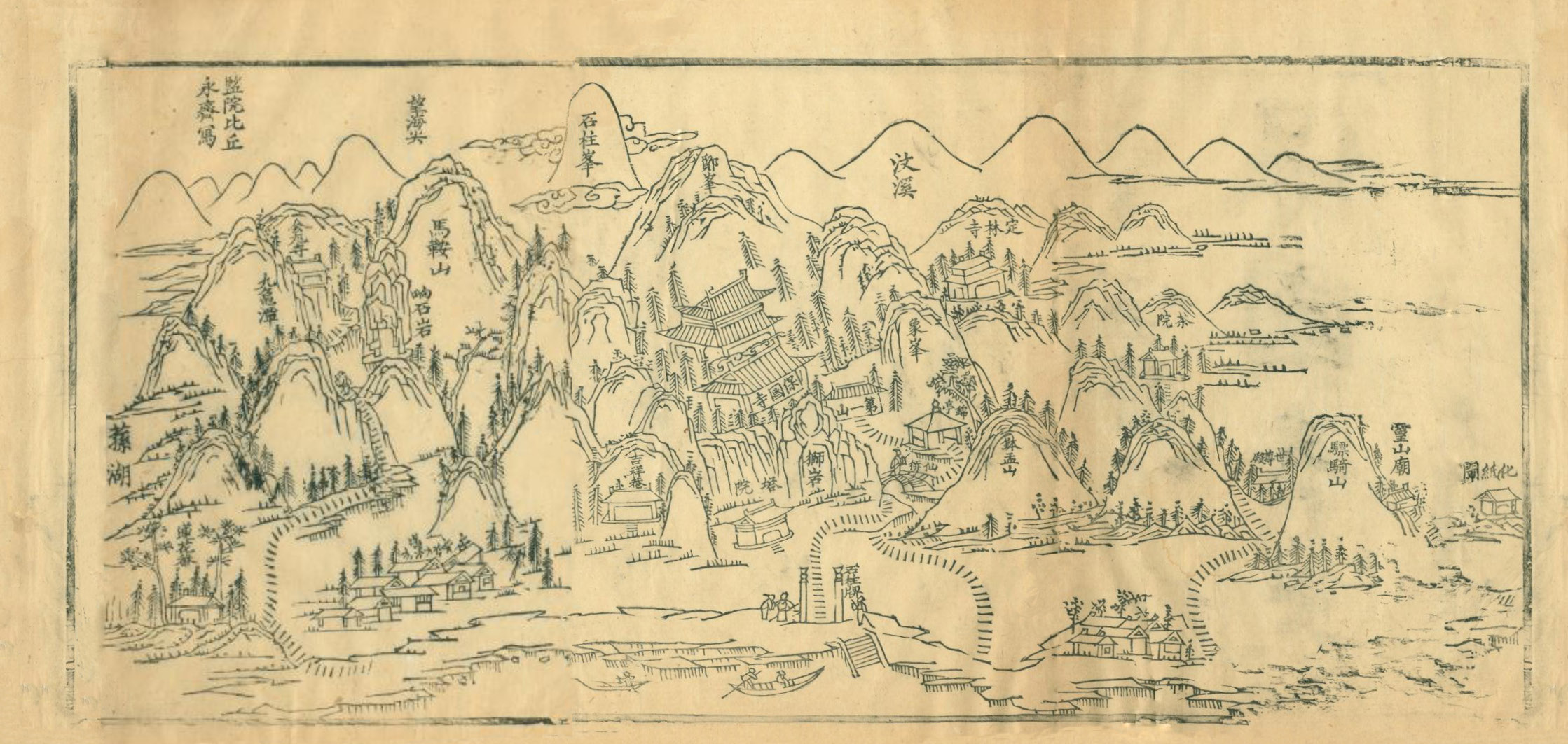 清嘉庆《保国寺志》中的保国寺位置图